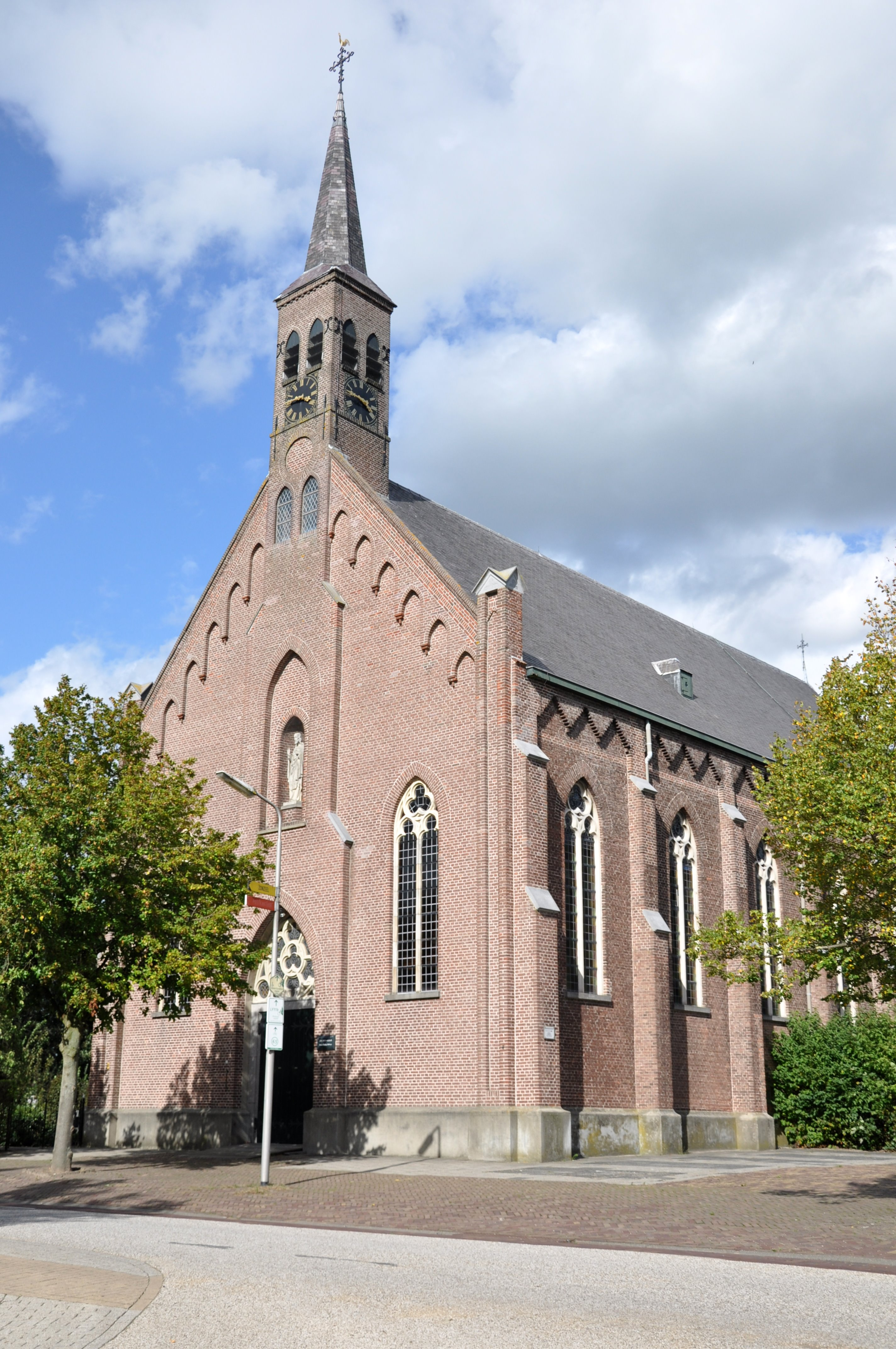 DSC_0070 RK Willibrorduskerk, Kerkdijk 1a, Hooge Zwaluwe, rm 521501